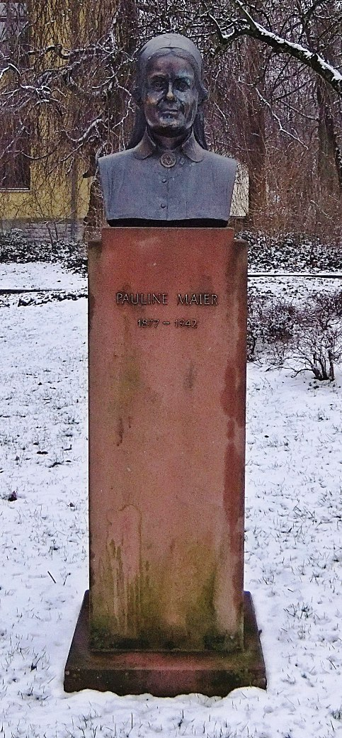 Baiertal: Denkmal für Pauline Maier vor dem Bürgerhaus (Unweit des Geburtshauses von Maier)